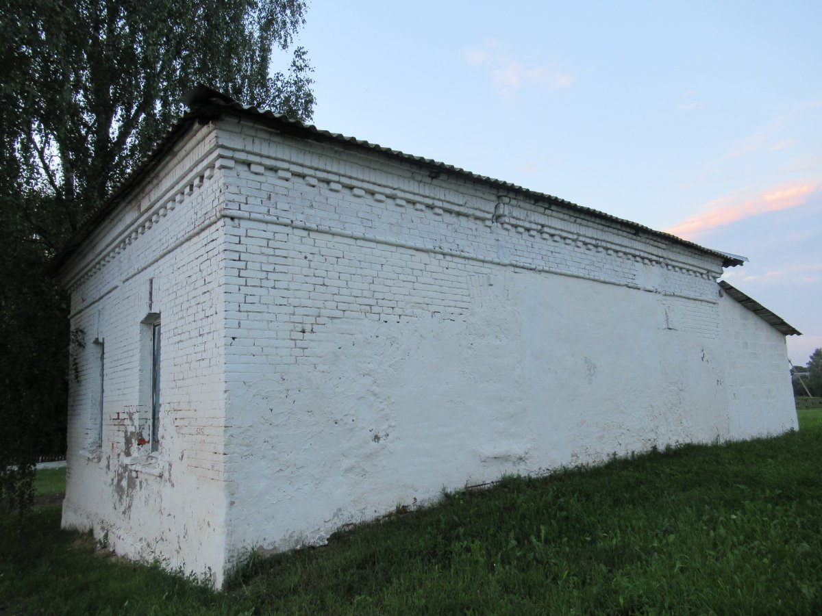 Старая камяніца ў аграгарадку Мілаславічах Клімавіцкага раёна Магілёўскай вобласці Беларусі